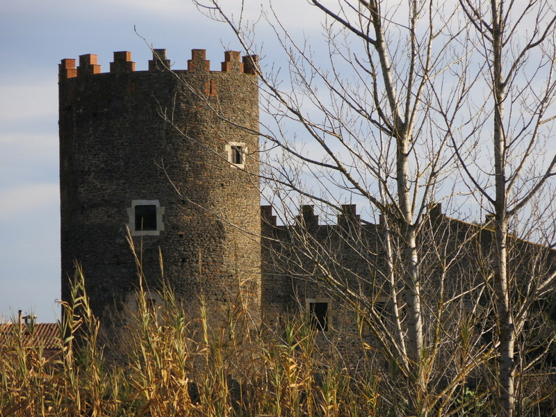 Torre Marata a Maçanet de la Selva - Catalunya